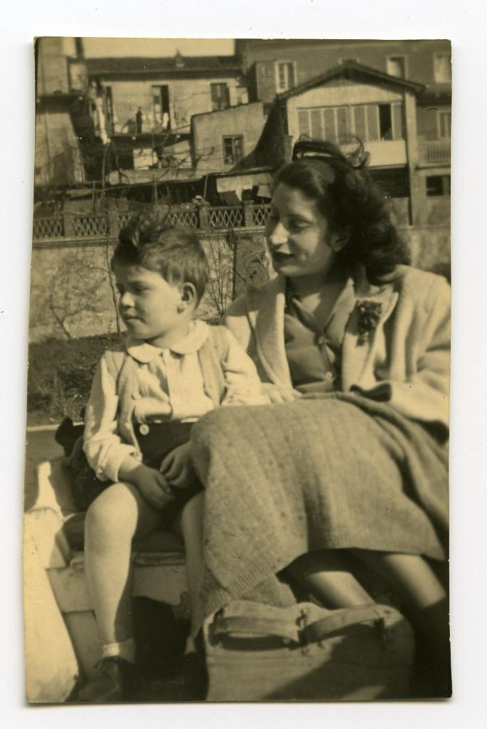 Elena Recanati Foà e il figlio Massimo in barca sul Po a Torino, nel 1947